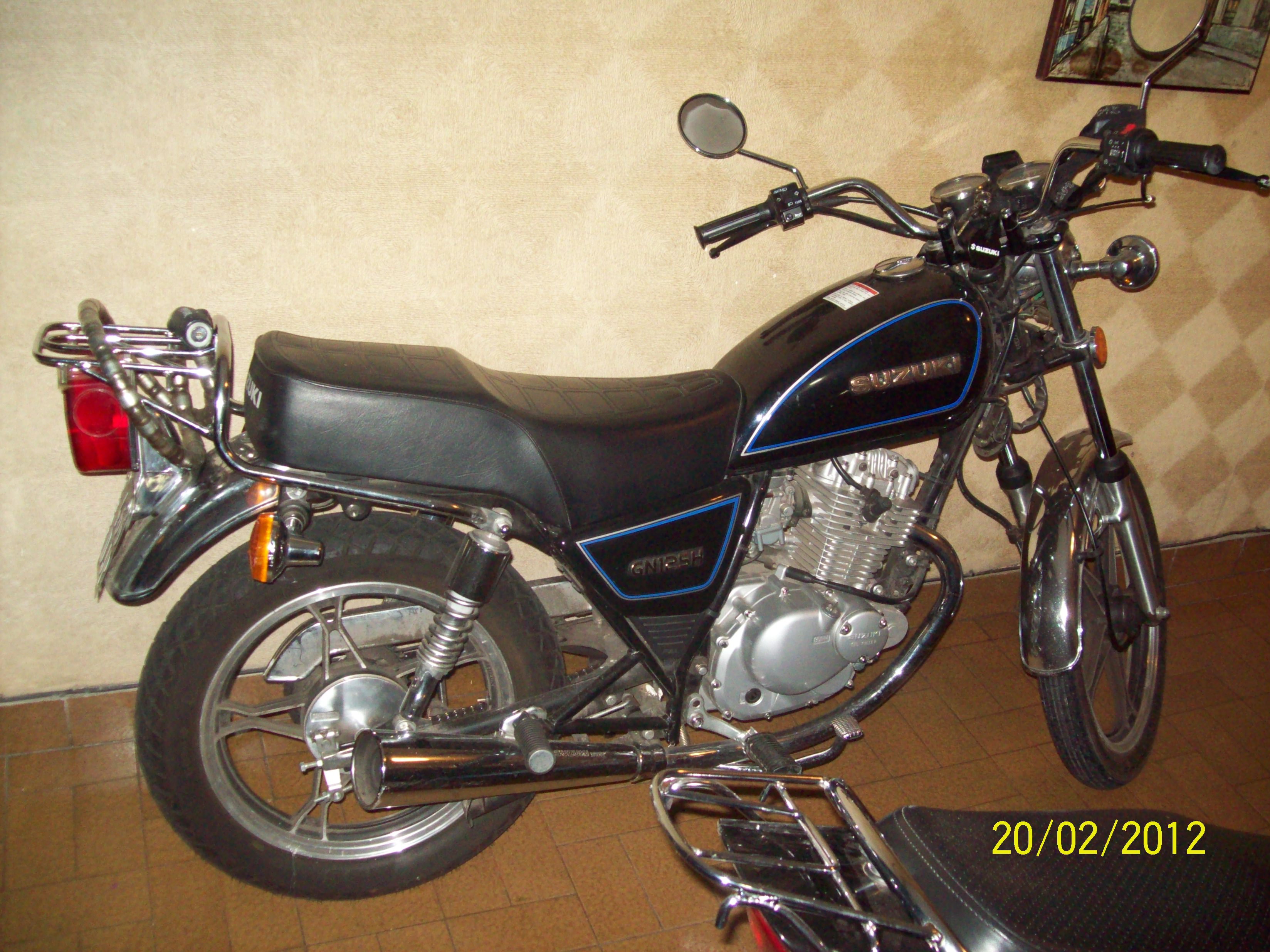 Suzuki GN 125